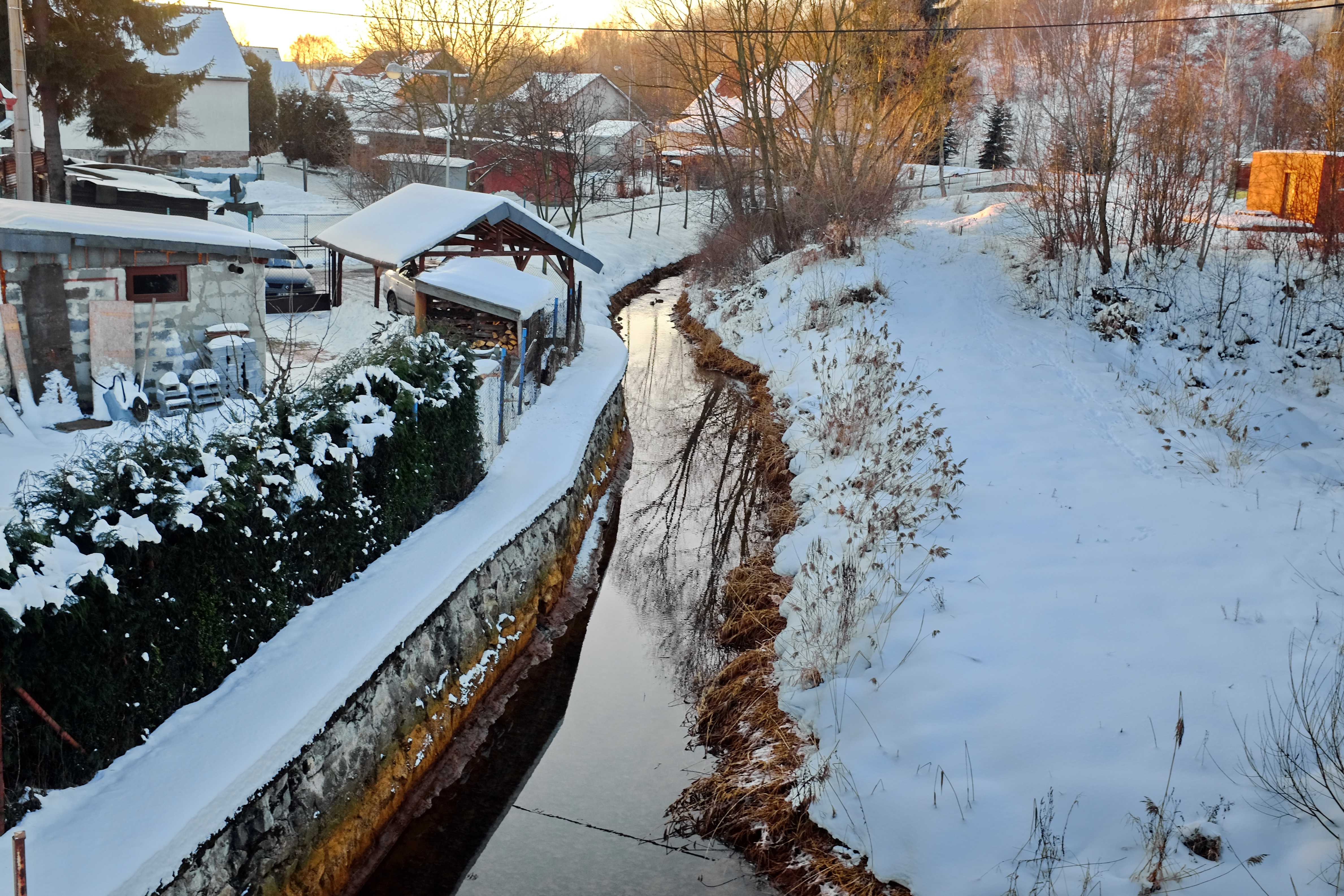 Pstružný potok v Královské Poříčí, okres Sokolov